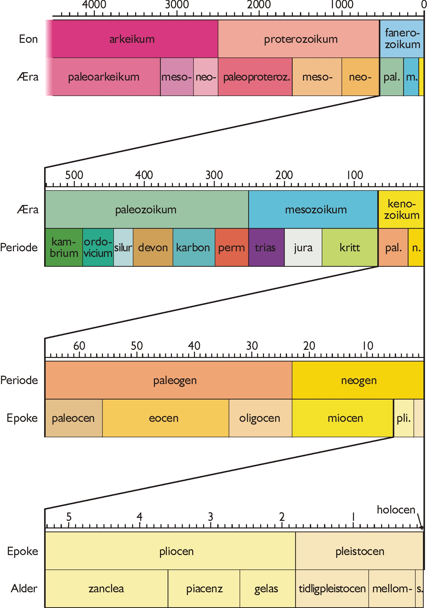 Den stratigrafiske inndelingen av jordens tidsaldre